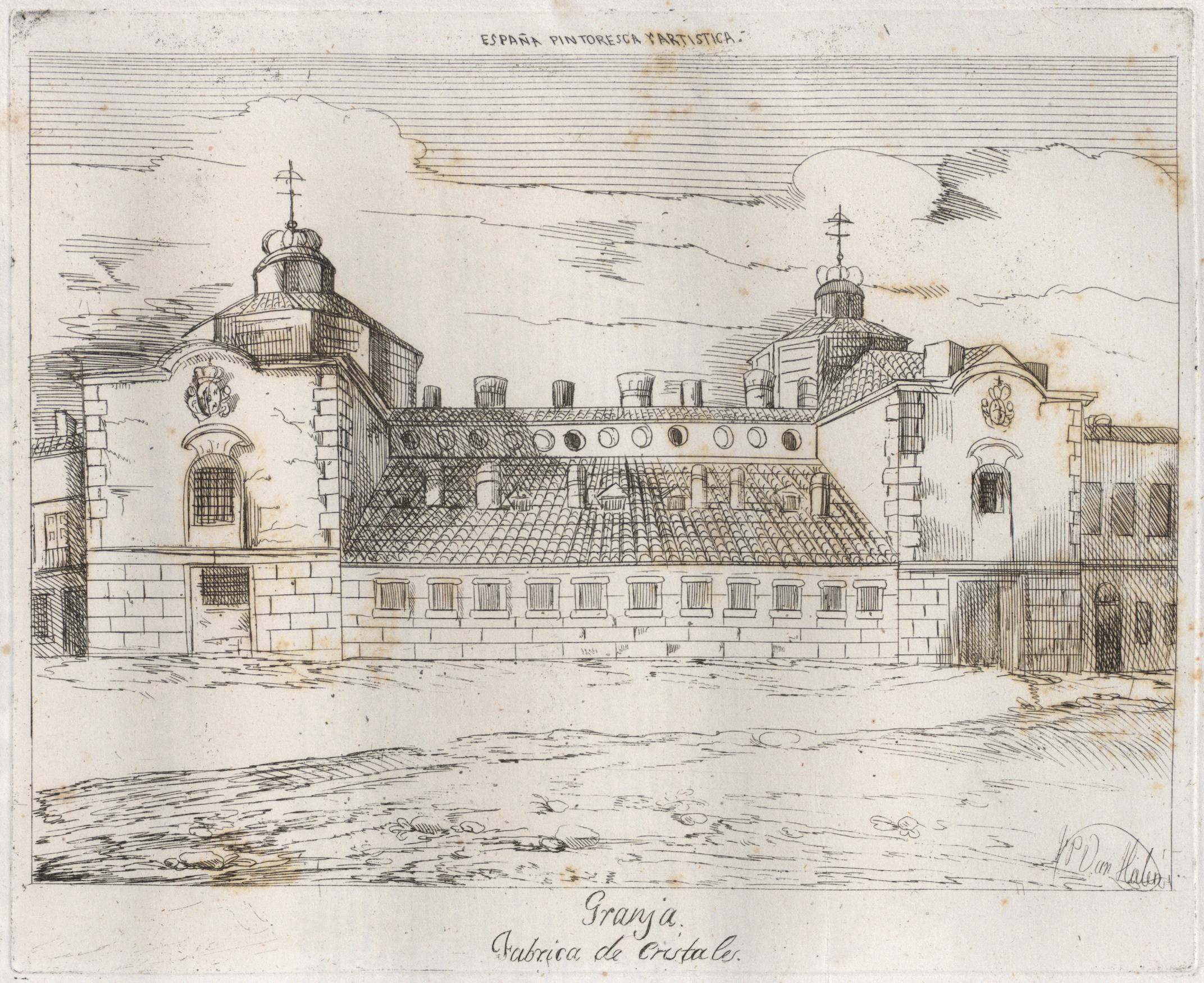 Granja, Fábrica de Cristales.